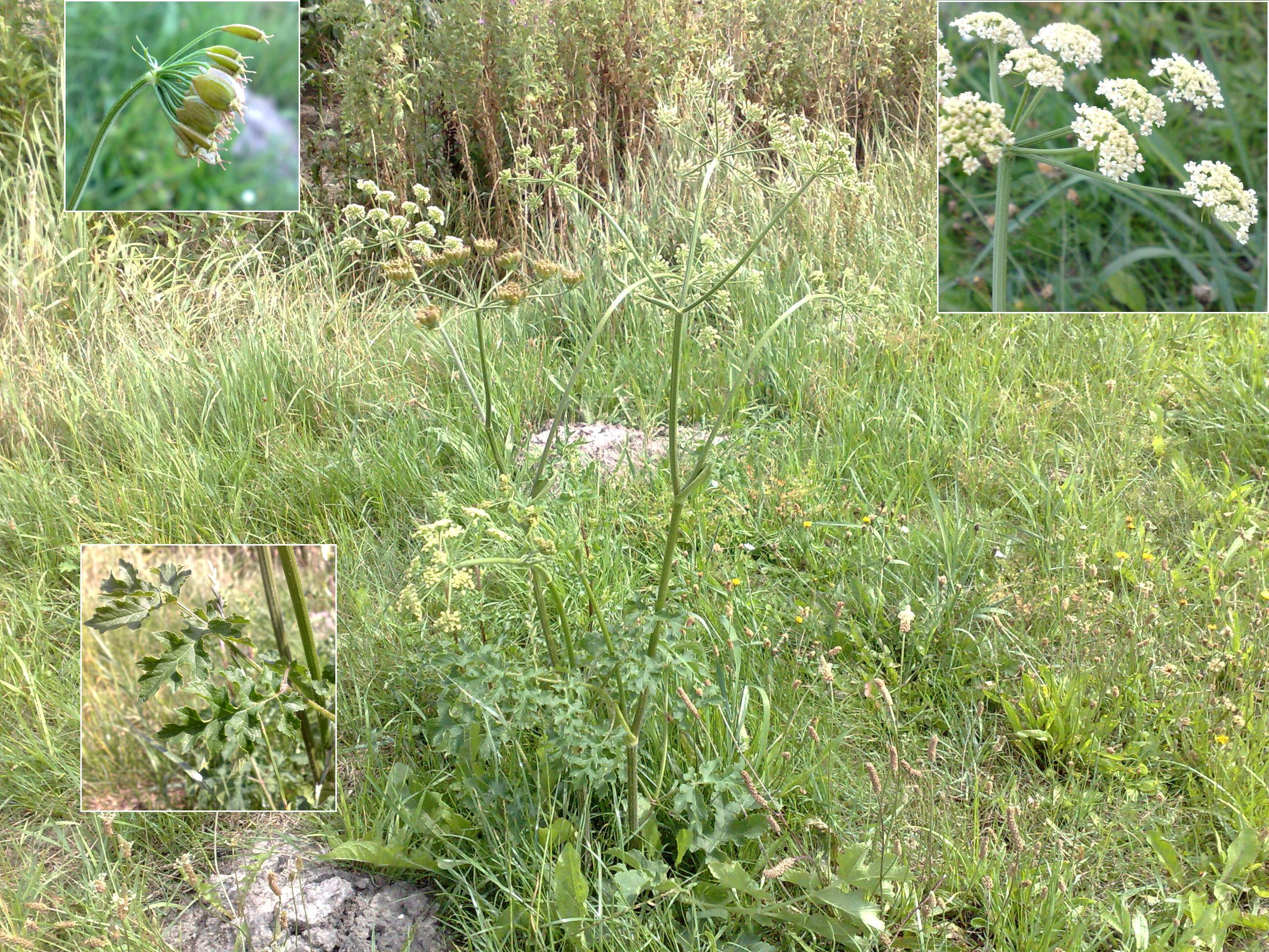 Wiesenbärenklau